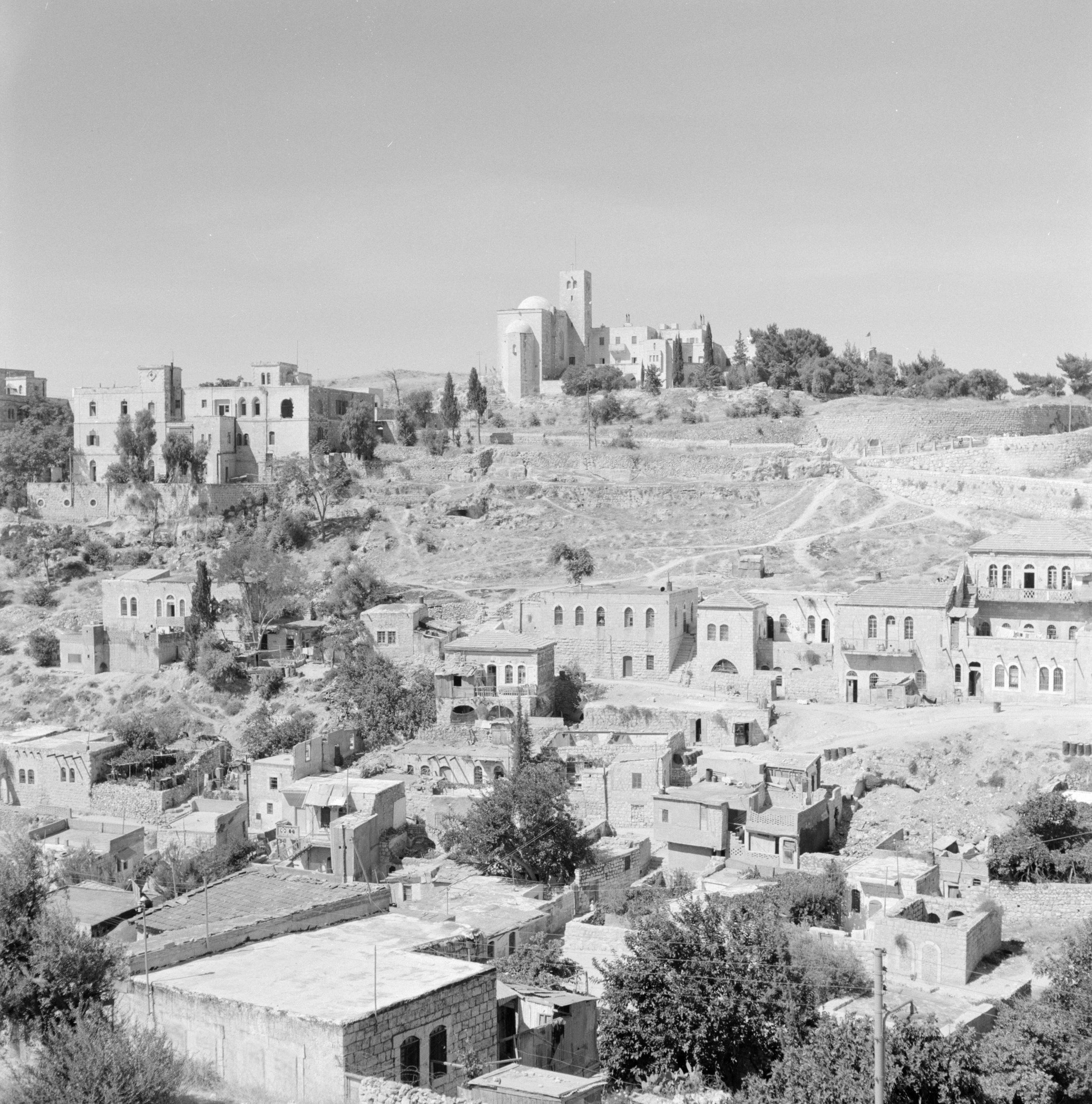 Collectie / Archief : Fotocollectie Van de Poll Reportage / Serie : Israël 1964-1965: Jerusalem (Jeruzalem), stadsbeelden Beschrijving : Bebouwing en begroeiing rondom Jeruzalem Datum : 1964 Locatie : Israël, Jeruzalem Trefwoorden : panorama's, stadsbeelden Fotograaf : Poll, Willem van de, [onbekend] Auteursrechthebbende : Nationaal Archief Materiaalsoort : Negatief (zwart/wit) Nummer archiefinventaris : bekijk toegang 2.24.14.02 Bestanddeelnummer : 255-2312